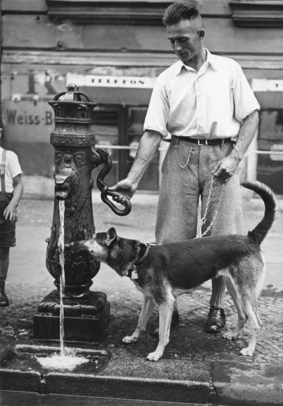 Berlin, Hund und Herrchen am Brunnen Scherl: Im Kampf gegen die Hitze. Der vierbeinige Hausgenosse erhält am Brunnen eine Erfrischung. 1932 25107-32 [Berlin]